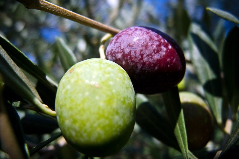 Maslina (Olea europaea) na Krku